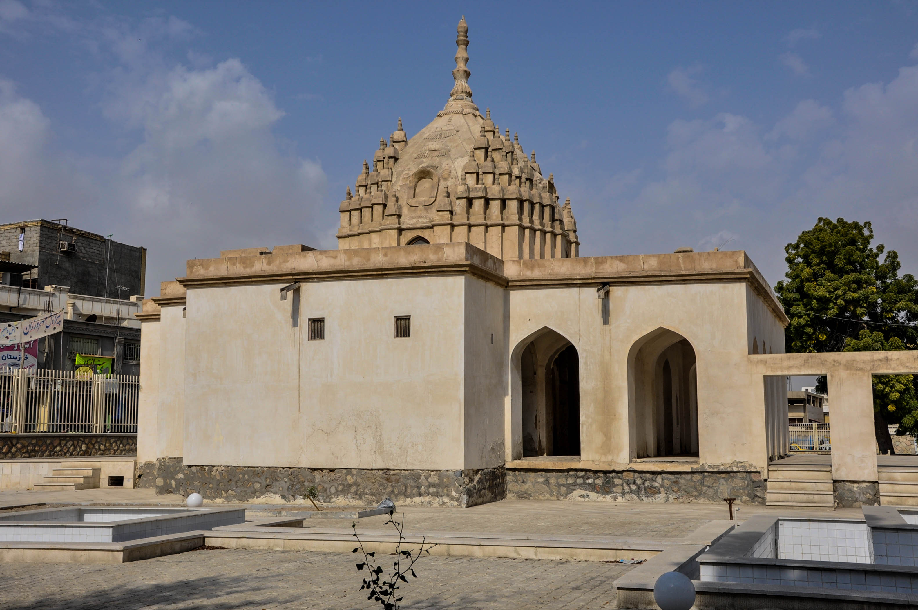 معبد هندوها در شهر بندرعباس